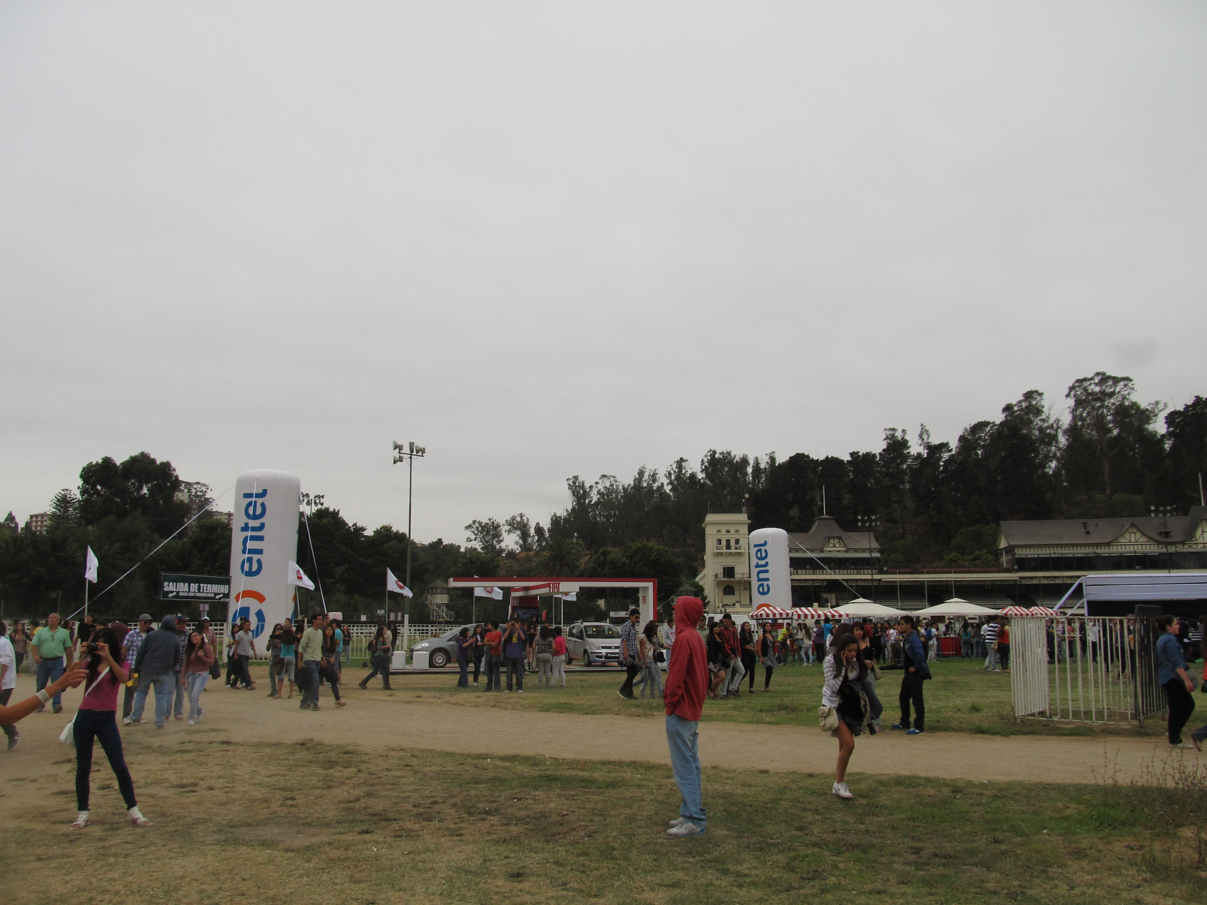 Concierto de David Guetta en el Valparaíso Sporting, Viña del Mar, Chile.